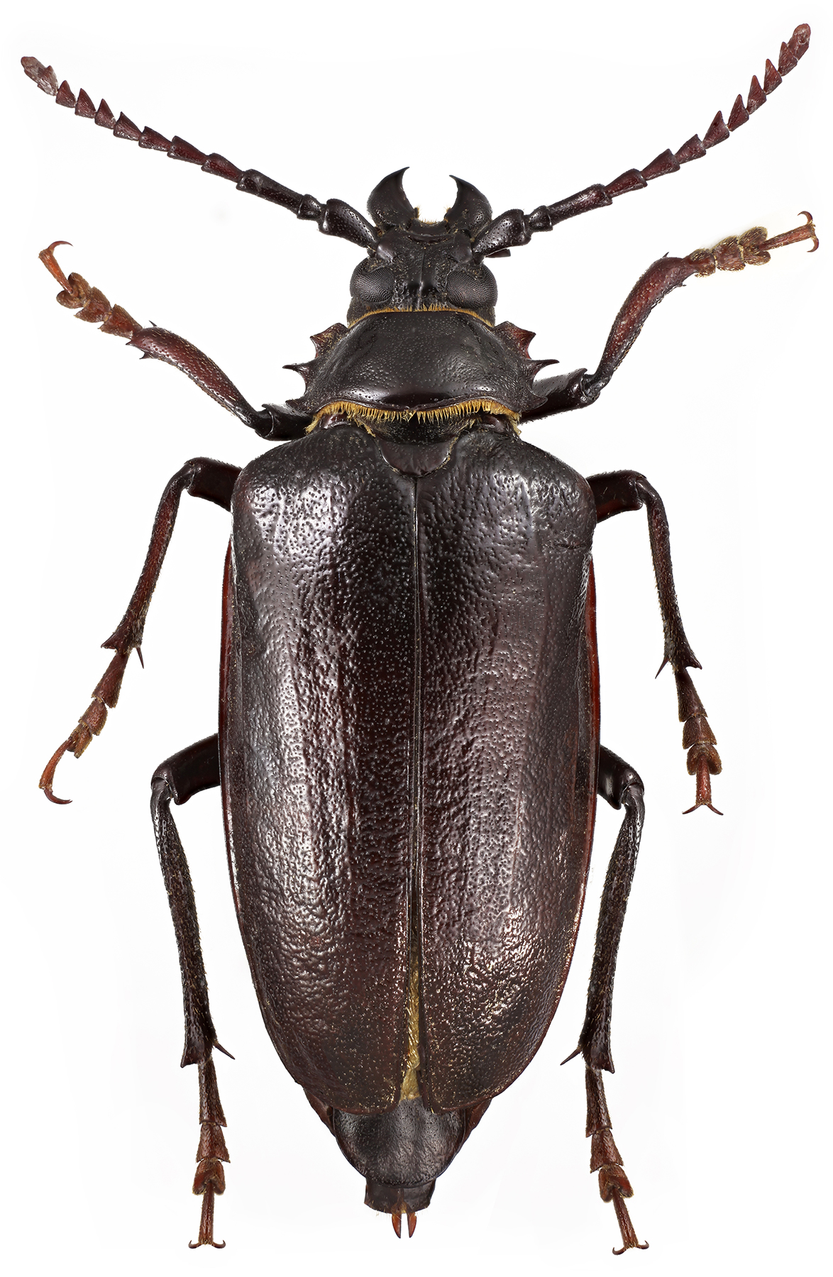 Prionus coriarius female